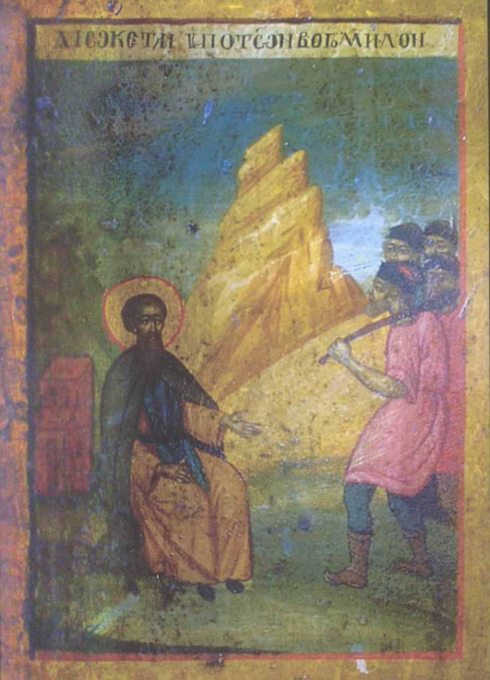 Икона с тем же сюжетом: богомилы пытаются прогнать святого Наума